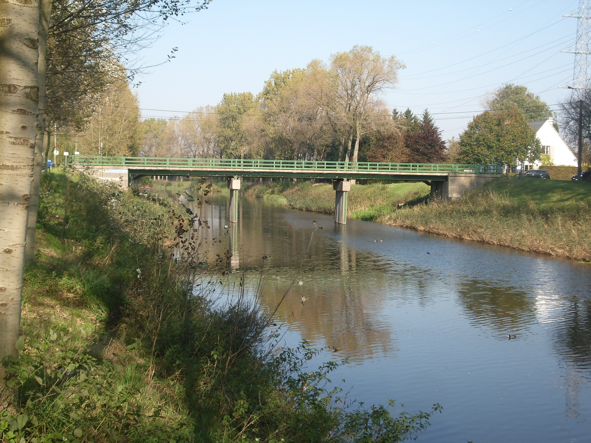 Raverschootbrug over het Schipdonkkanaal - Raverschootstraat - Eeklo - Oost-Vlaanderen - België